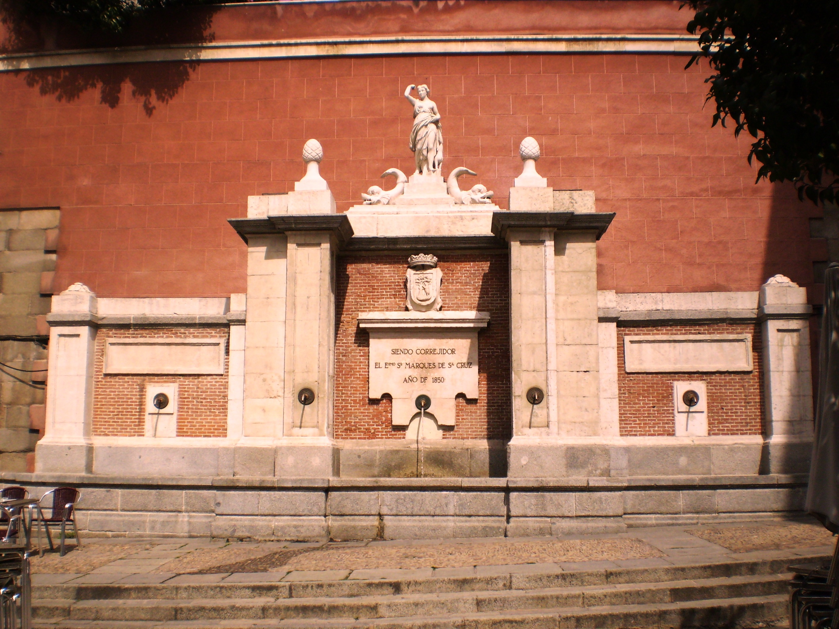 Fuente de Diana Cazadora o de la Cruz Verde. Fountain of 19th cent. in Madrid, Spain